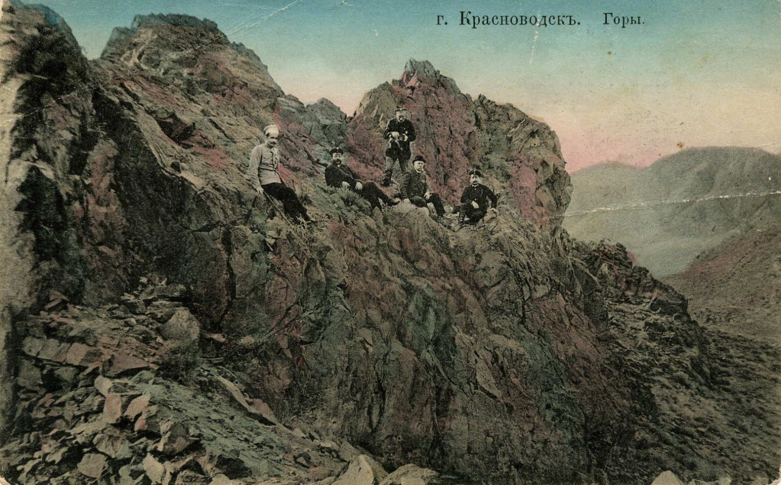 "г. Красноводск. Горы". Открытка.